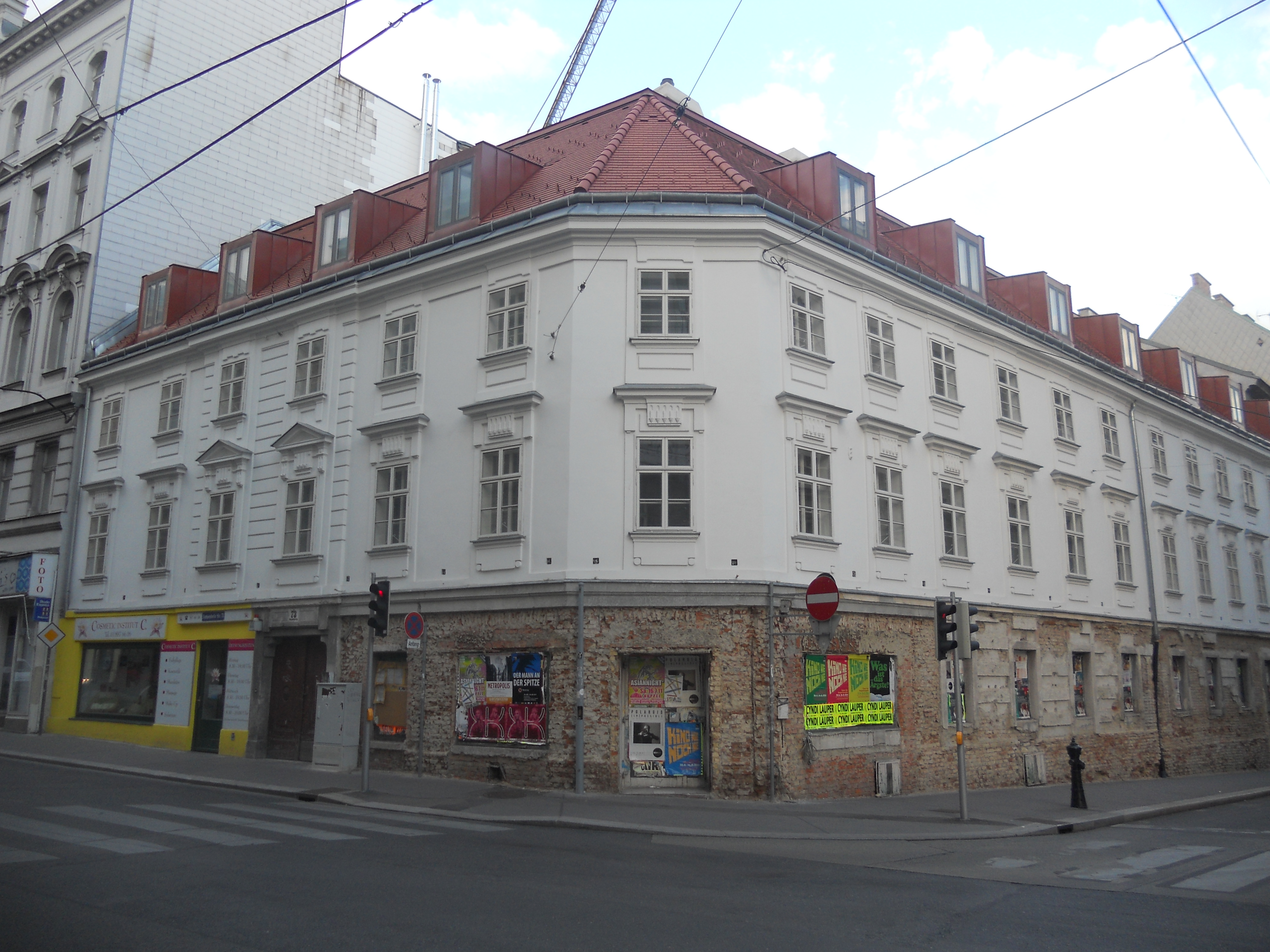 Haus "Zum Auge Gottes", Gumpendorferstraße 73 in Wien